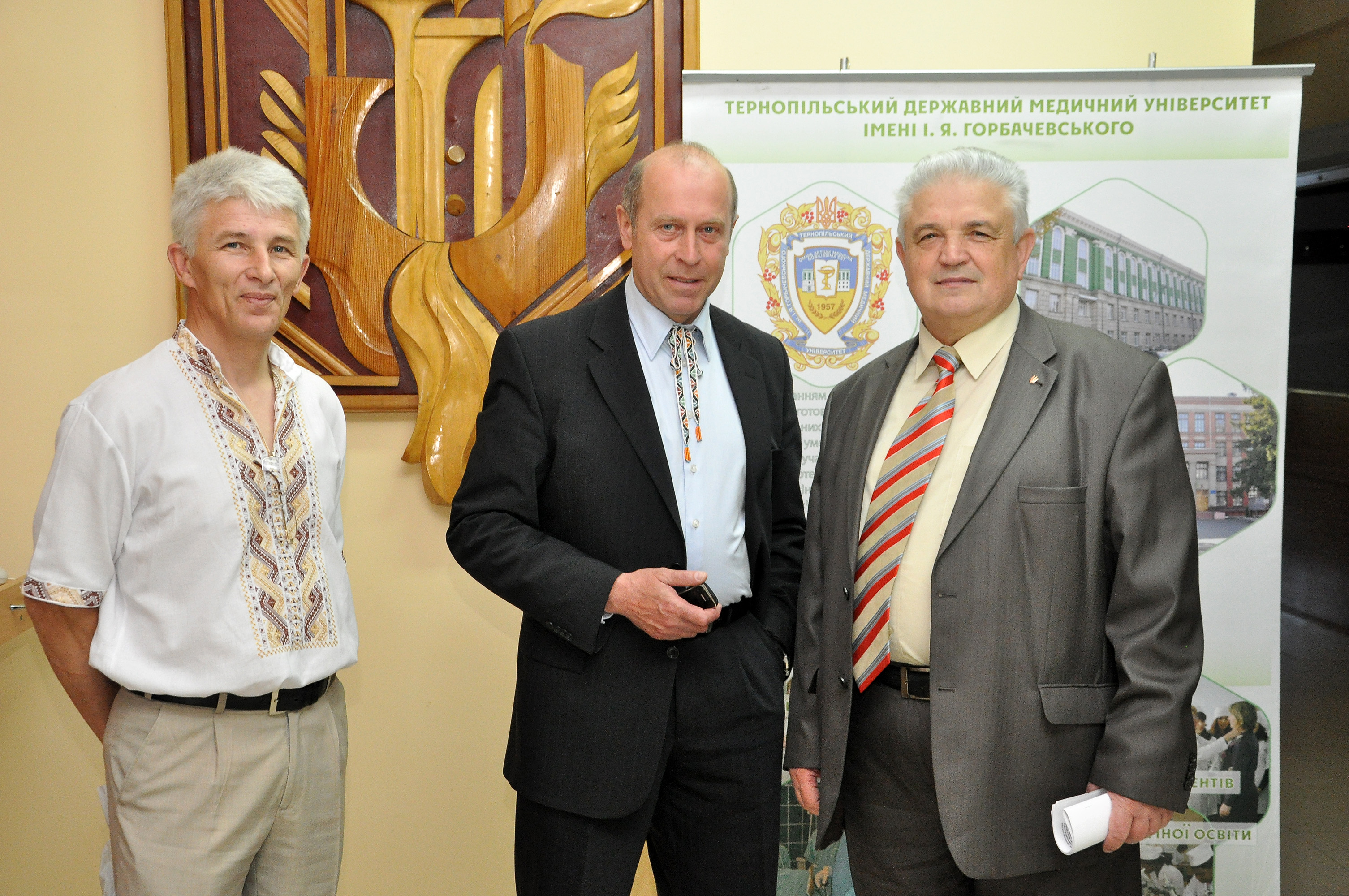 Доцент Ігор Папінко, професори Степан Вадзюк і Микола Швед на XII Всеукраїнській науково-практичній конференції з міжнародною участю «Актуальні питання якості медичної освіти», що відбулася 21-22 травня 2015 року в НОК «Червона калина» Тернопільського державного медичного університету імені І. Я. Горбачевського.